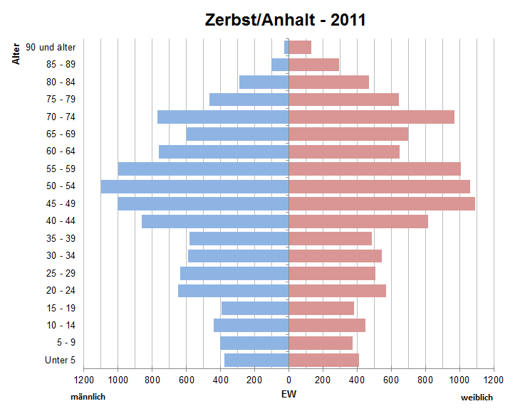 Bevölkerungspyramide der Stadt Zerbst/Anhalt nach Zensus 2011.